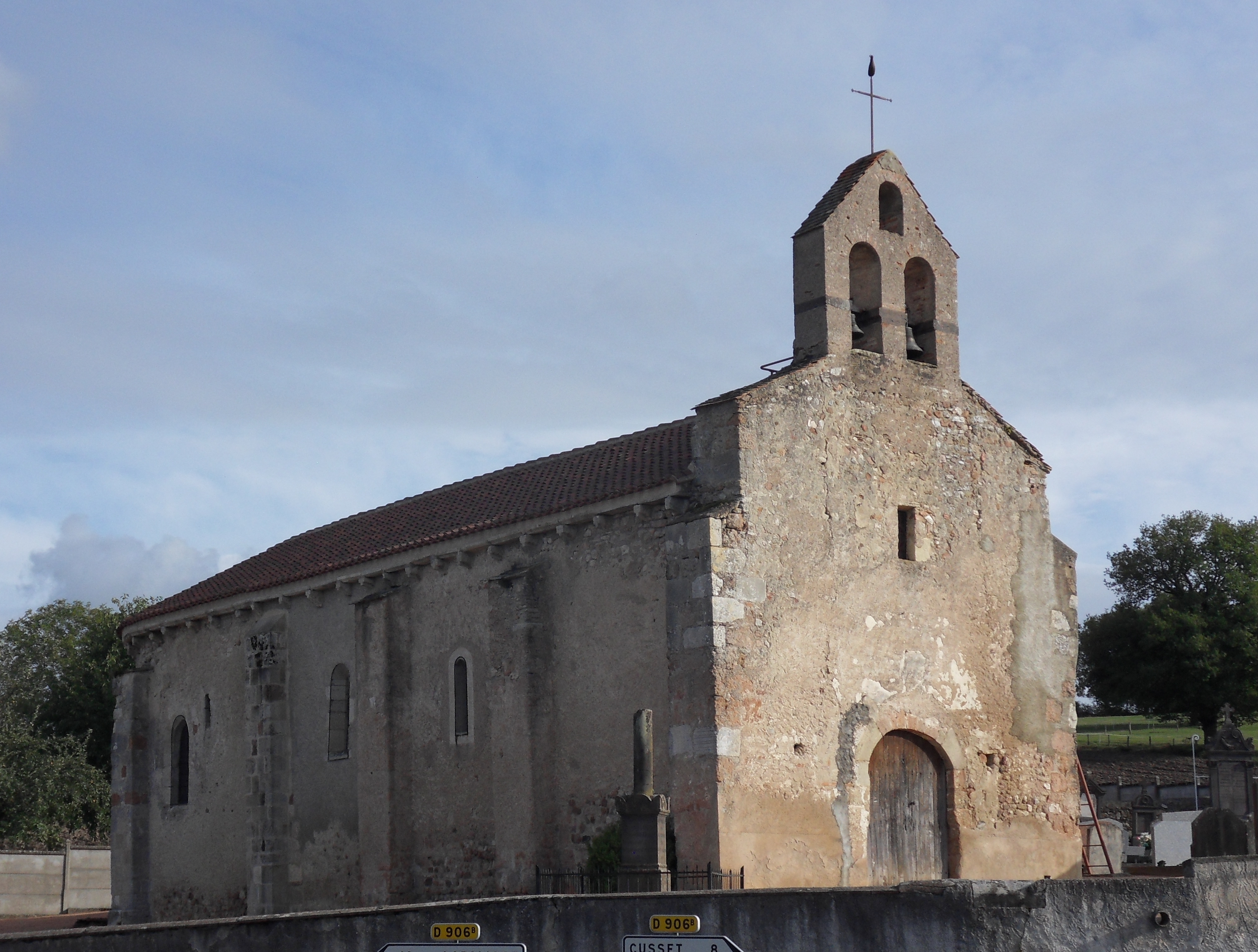 Église Saint-Pierre, (Inscrit, 1933) .